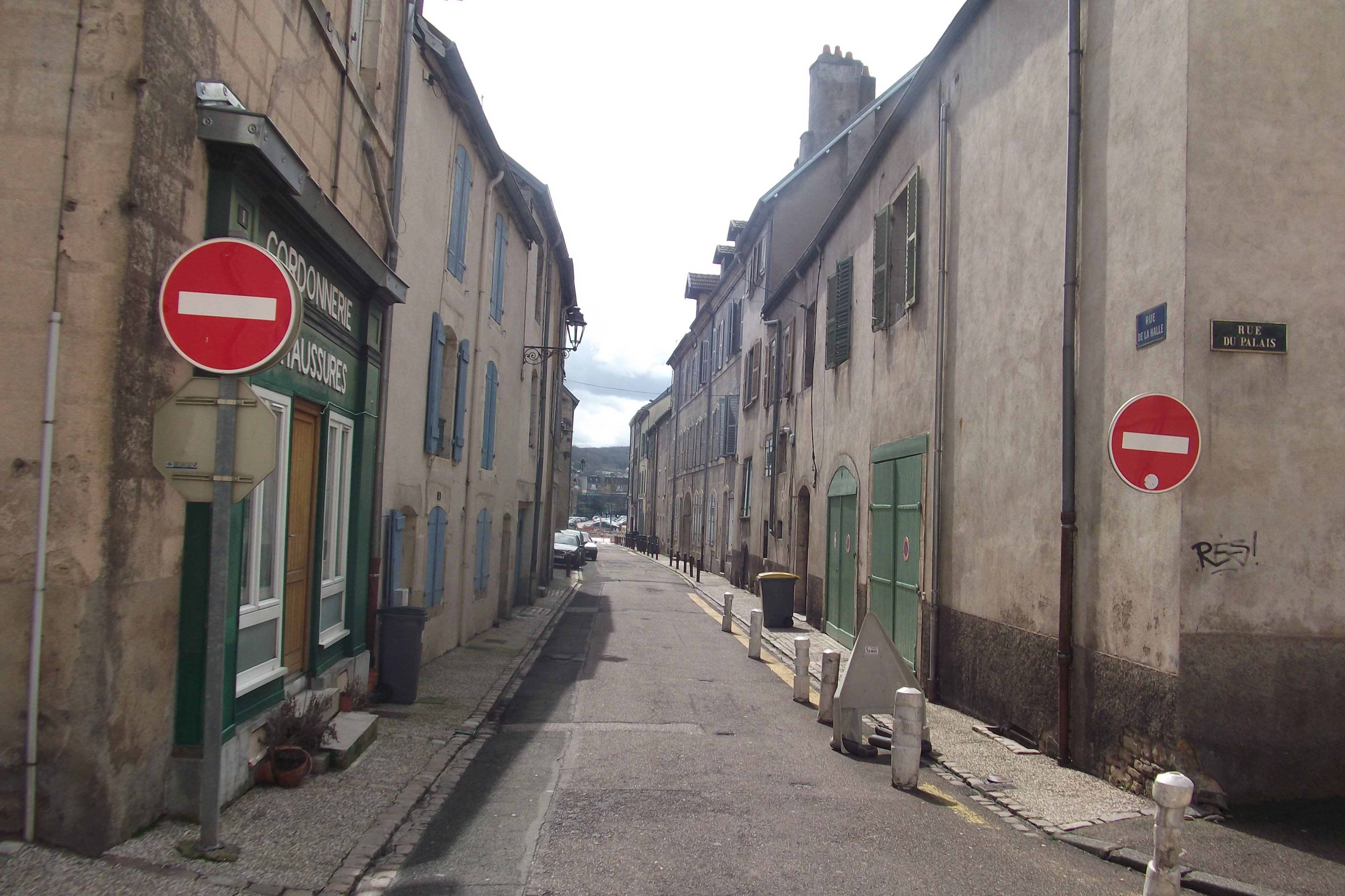 La rue de la Halle dans le centre-ville de Vesoul (Haute-Saône, Franche-Comté)